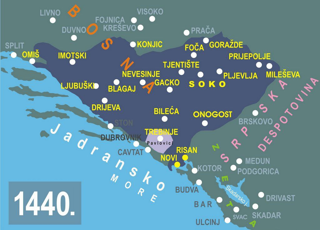 Vojvodstvo Stefana Vukčića Kosače 1440.